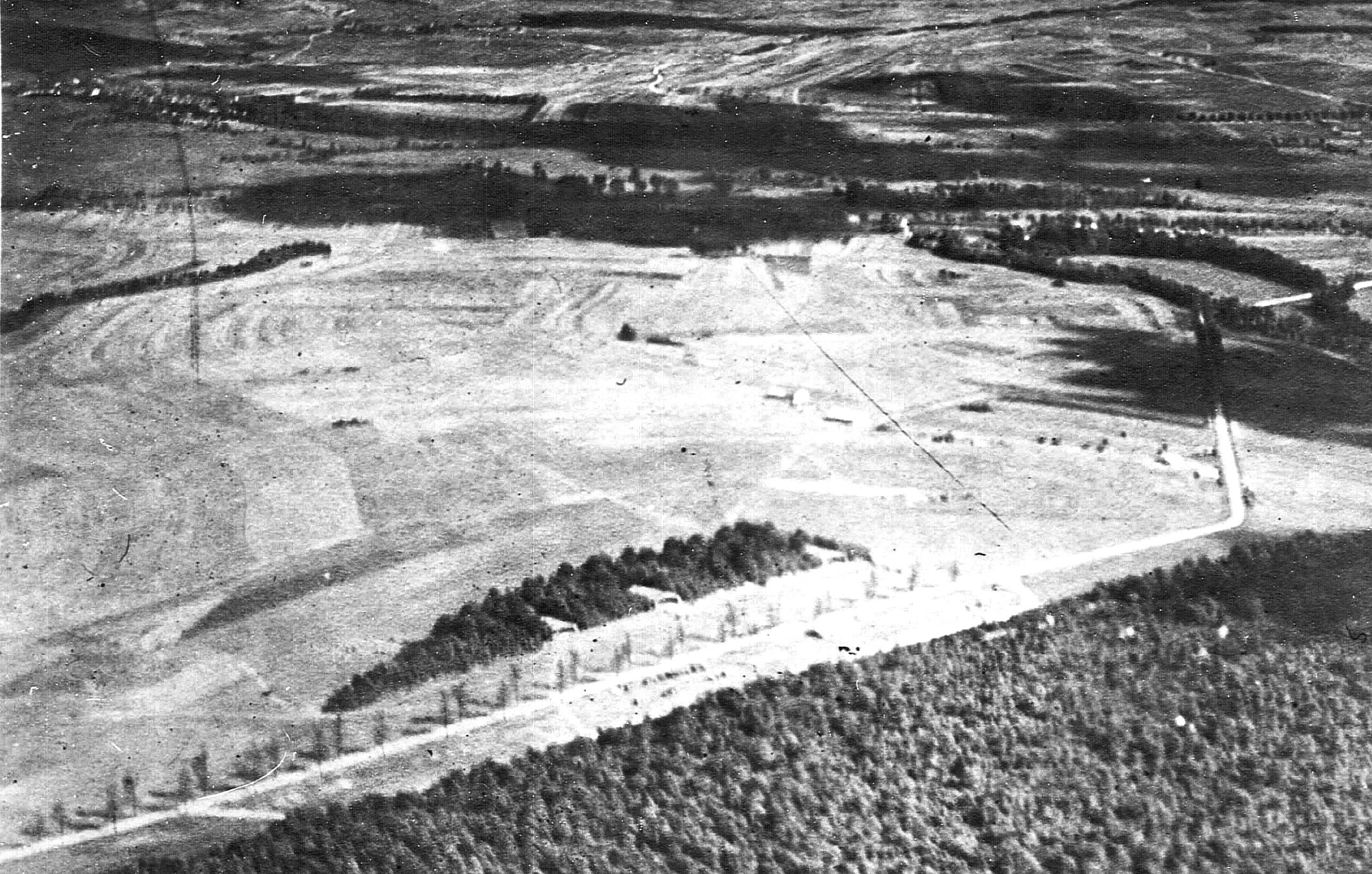 Vaucouleurs Aerodrome - South - France